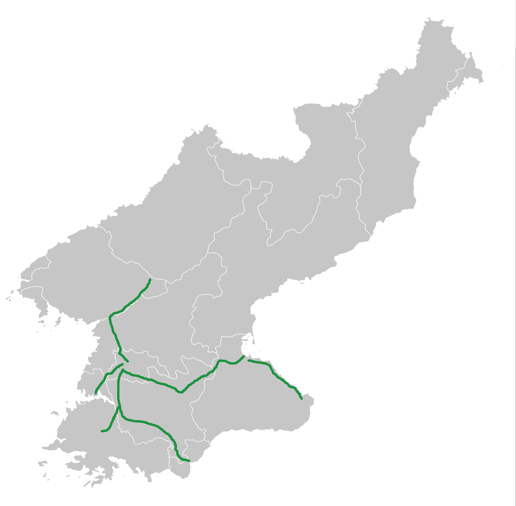 نقشه آزادراه های در دست بهره برداری کره شمالی